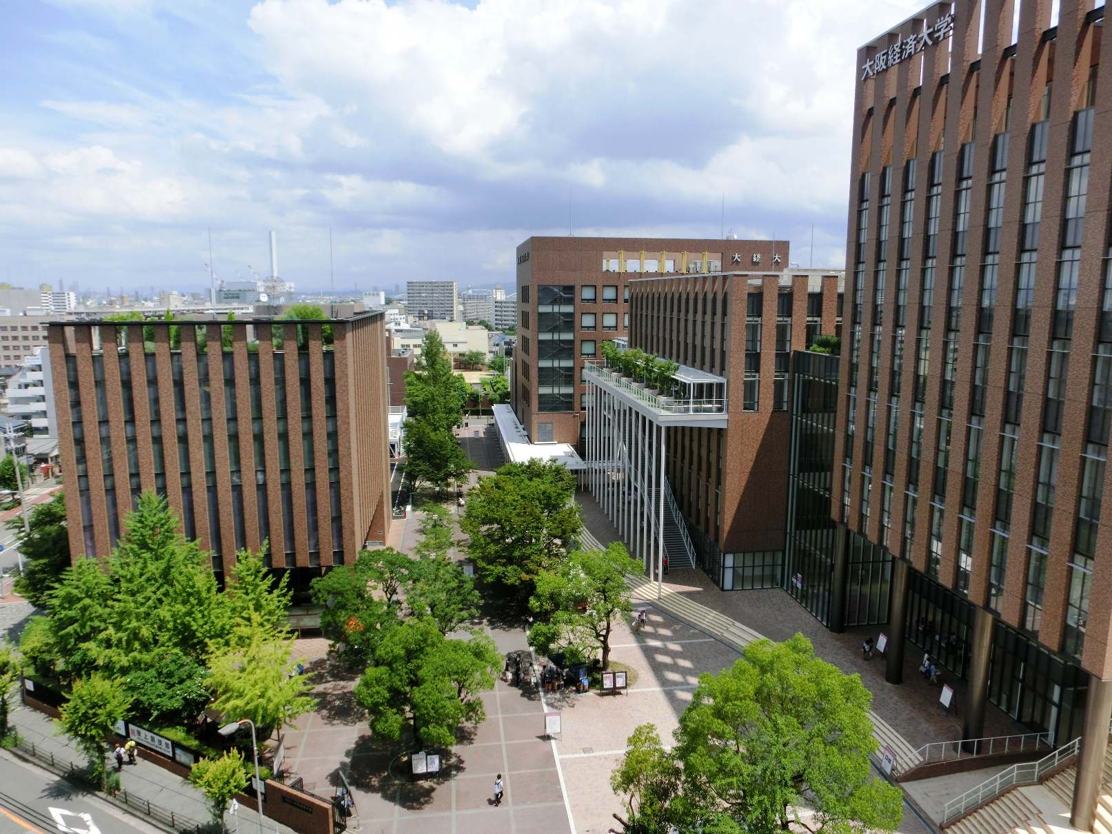 大阪経済大学の左がC館。右がD館でその奥がG館。